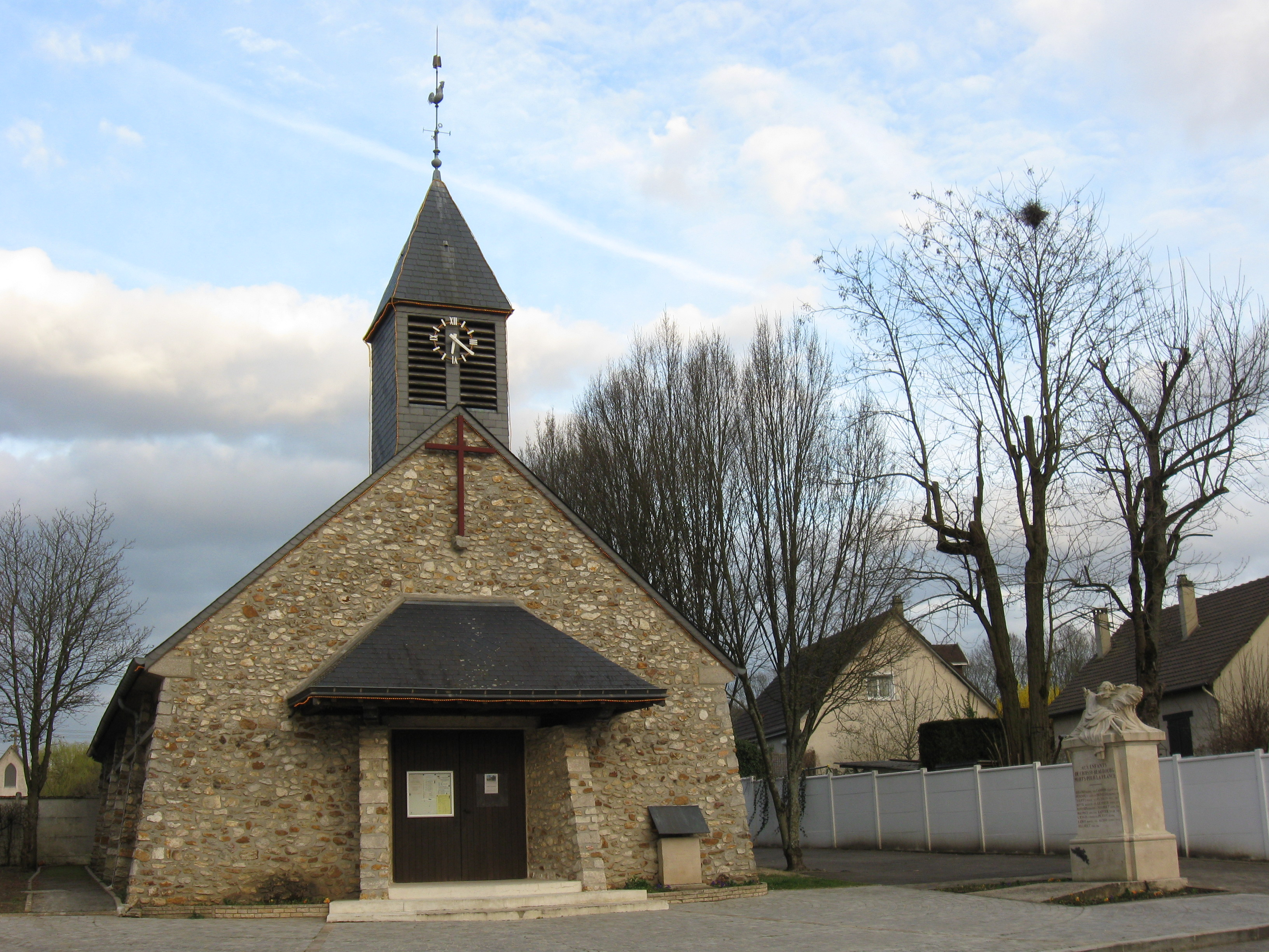 Église Saint-Marcel (Marcel de Chalon) de Croissy-Beaubourg. (Seine-et-Marne, région Île-de-France).